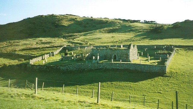 Kilkivan Cemetery and Chapel, Drumlemble, Kintyre